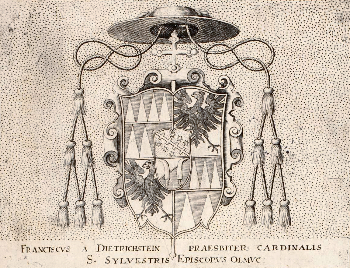 Wappen des Kardinals Franz von Dietrichstein, Bischof von Olmütz, aus: Octavius de Strada: Symbola varia Diversorum Principum Sacrosanc: Ecclesiae & Sacri Imperii Romani / Ex mus[a]eo Octavii de Strada Civis Romani Simbola desumpta sunt. S.C.Mtis sculptor Aegidius Sadeler excudit Pragae M.D.C.II., [1652]